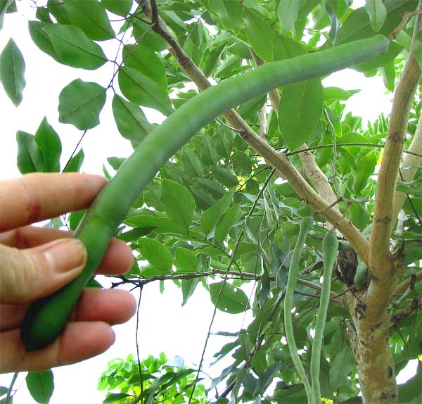 An immature (green) Cassia fistula pod.